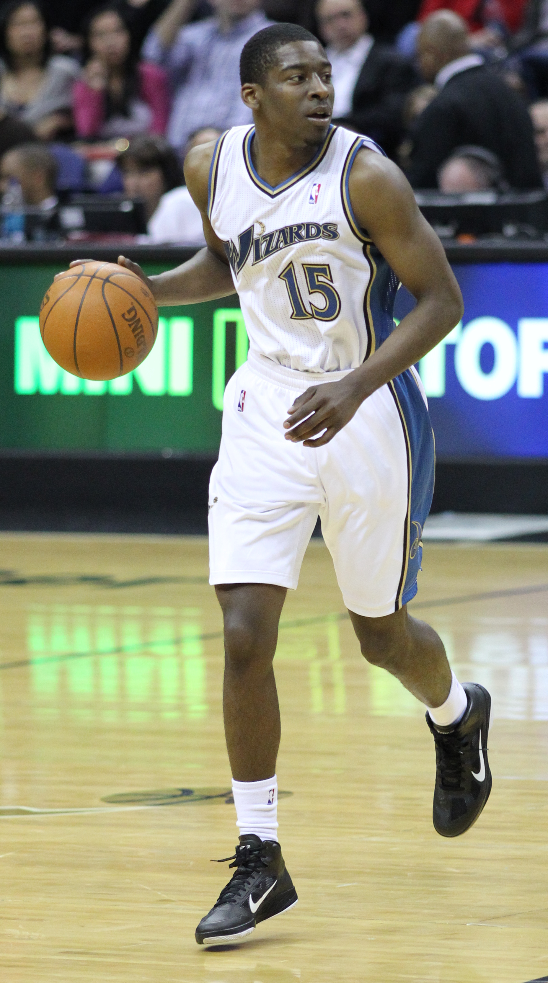 Wizards v/s Mavericks 02/26/11